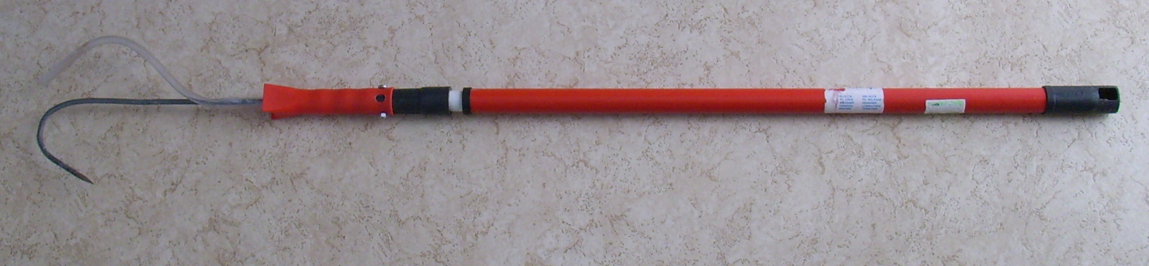 Gaff zum Anbordbringen eines grossen Fisches. Länge 115 cm, selbstgebaut für Hochseefischerei.